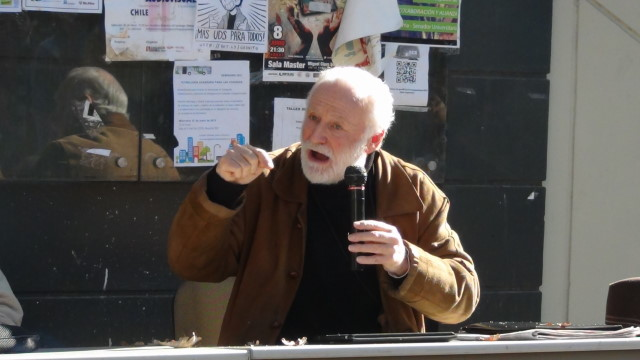 Manuel Riesco en la Facultad de Ciencias Físicas y Matemáticas, Universidad de Chile.